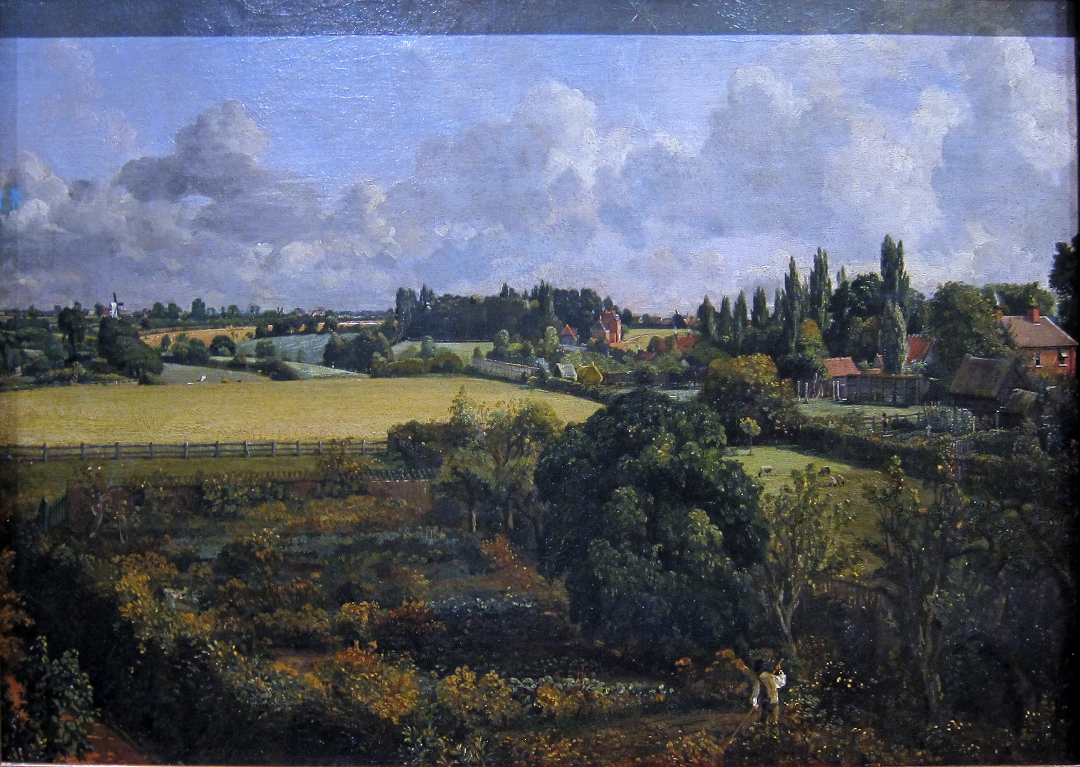 Golding Constable's Kitchen Garden (1815), à East Bergholt, par John Constable dans la Christchurch Mansion d'Ipswich.